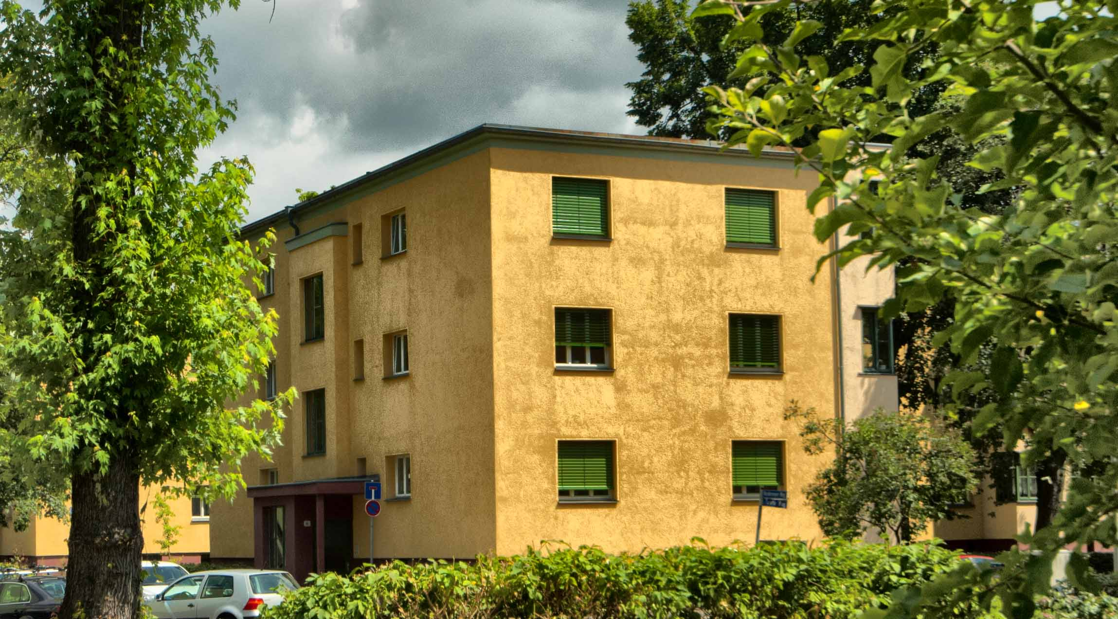 1. Etage Todesort des Hans Rüdiger NDPD am 24.12.1964 in Leipzig-Gohlis, Norderneyer Weg 4